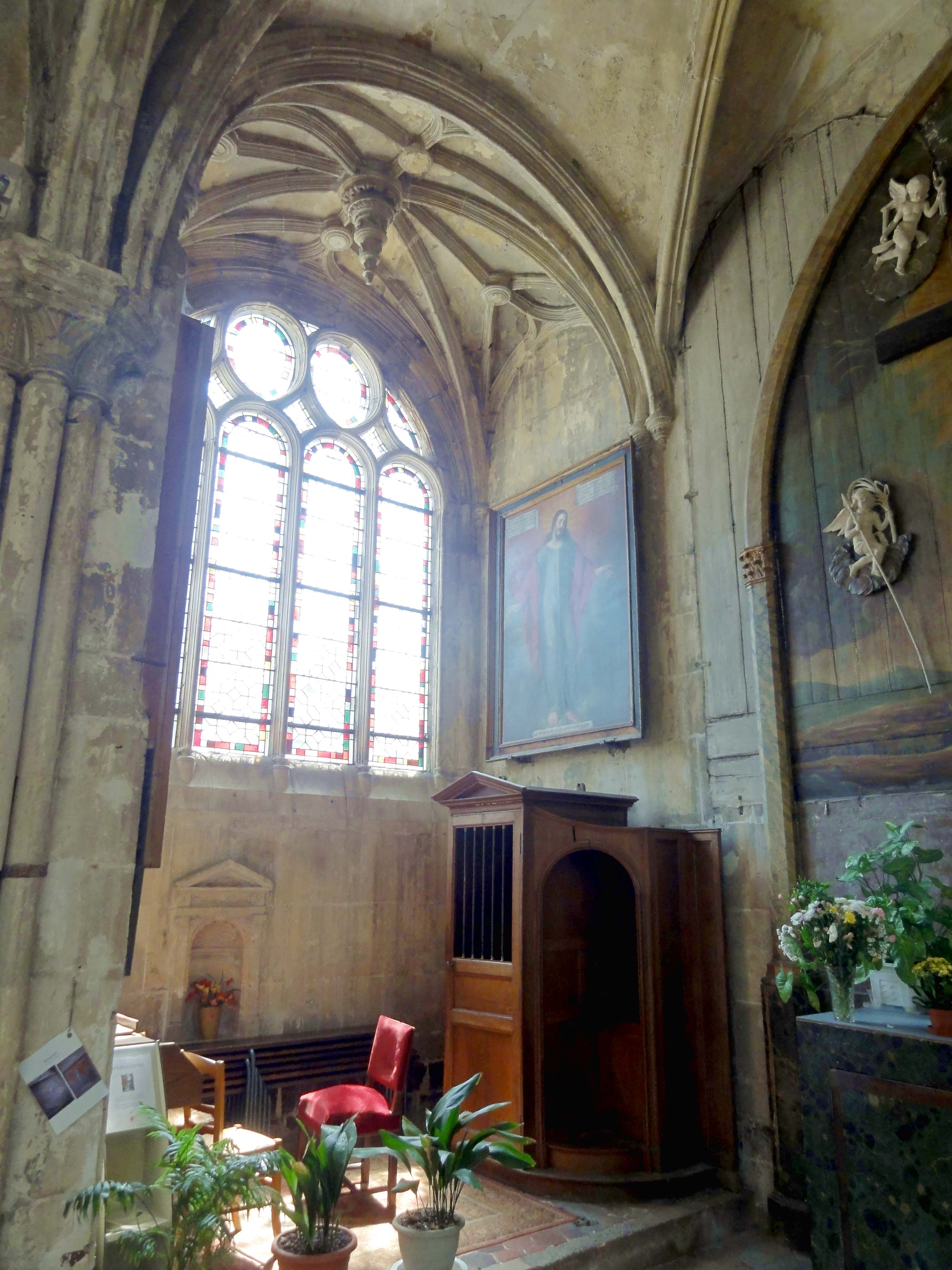 Voir titre.